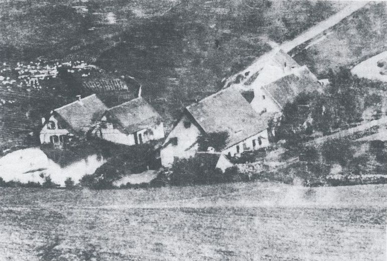 Ziegelhütte Oberkochen: Von links nach rechts: die beiden Gebäude direkt am Ölweiher gehörten dem Bohrerfabrikanten Albert Leitz, rechts davon die Ziegelei und Ökonomie- und Wohngebäude des Carl Gold, Ziegler. Der helle Bogen oben rechts ist der Kocher, das gerade Stück Weg links oben ist der Vizinalweg Nr. 9, später Ziegelstraße, später Wacholdersteige, heute Leitzstraße. Das Foto stammt aus der Sammlung von Kuno Gold, einem Nachfahren des Ziegeleibegründers Johann Michael Gold (1816-1871).